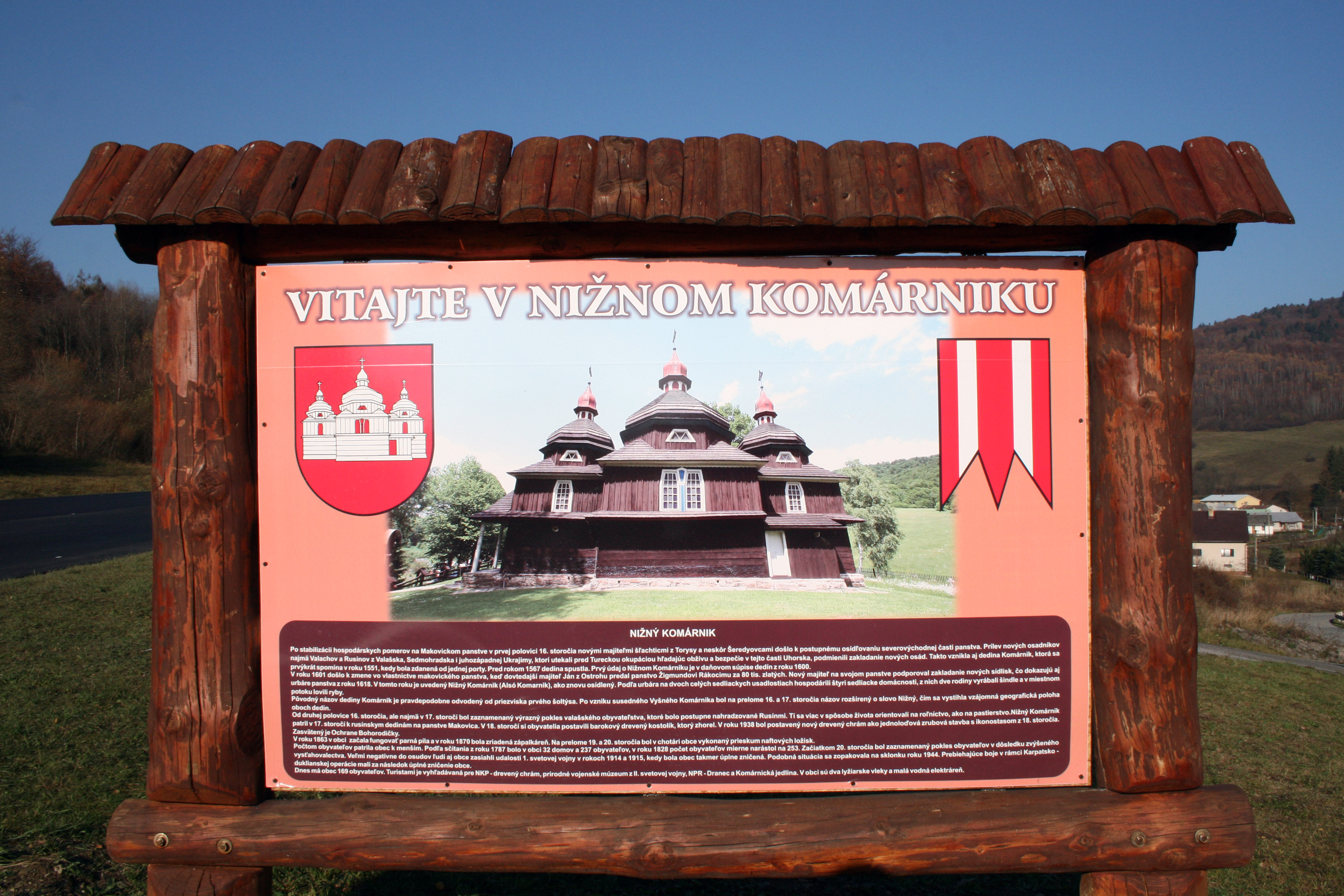 Informačná tabuľa pri vstupe do obce